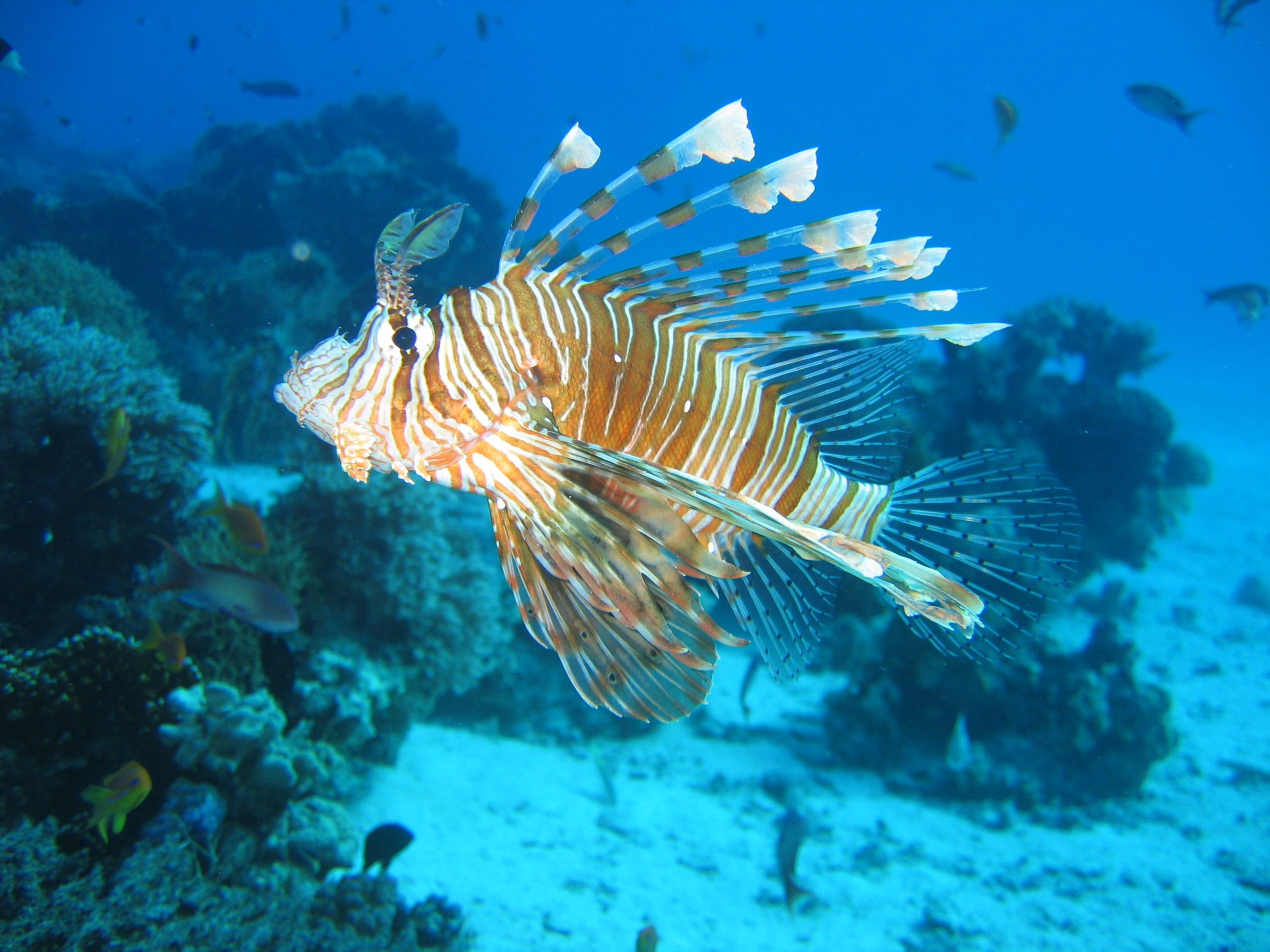 der rotfeuerfisch hat rot oder goldbraune streifen und wird ca. 38cm gross er hat sehr viel gift in seinen rückenflossen und ist fische